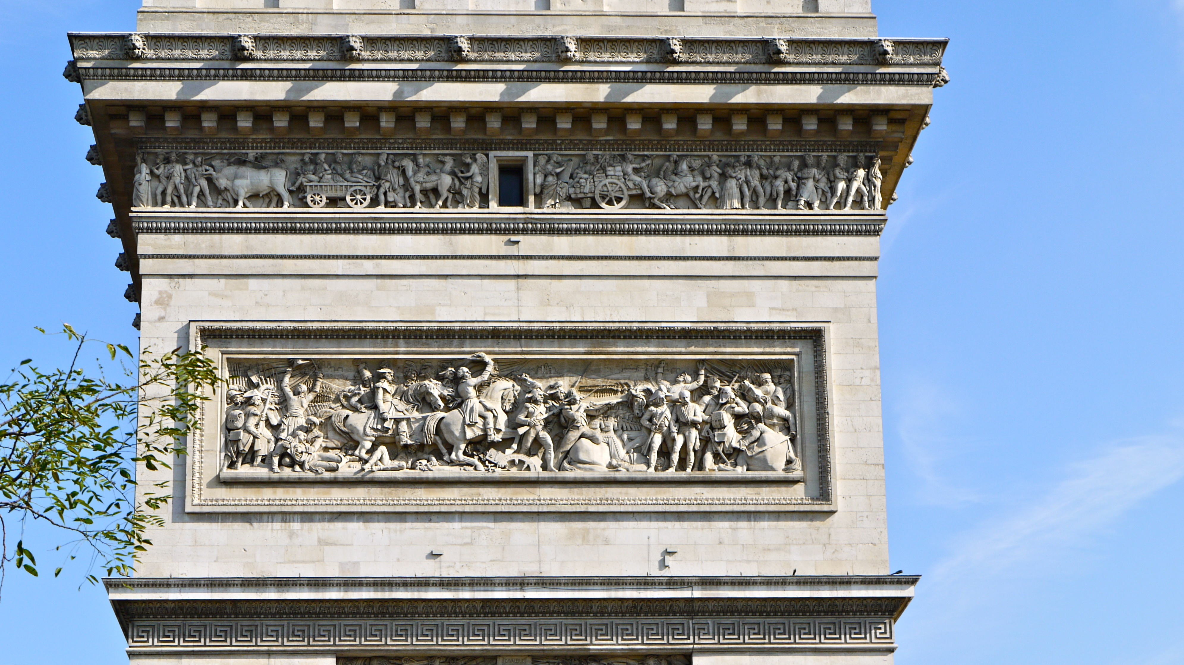 P1080962 France, Paris, place Charles De Gaulle (autrefois de l'Étoile), l'Arc de Triomphe du côté de l'avenue Kléber : la bataille de Jemmapes